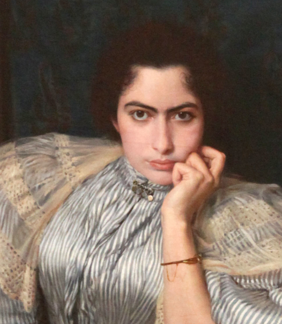 Museu Nacional de Belas Artes - Rio de Janeiro - Rodolfo Amoedo - Más Notícias - 1895 - óleo sobre tela - 100 x 74 cm - Assinada: R Amoêdo Rio 895 - compra: 1895